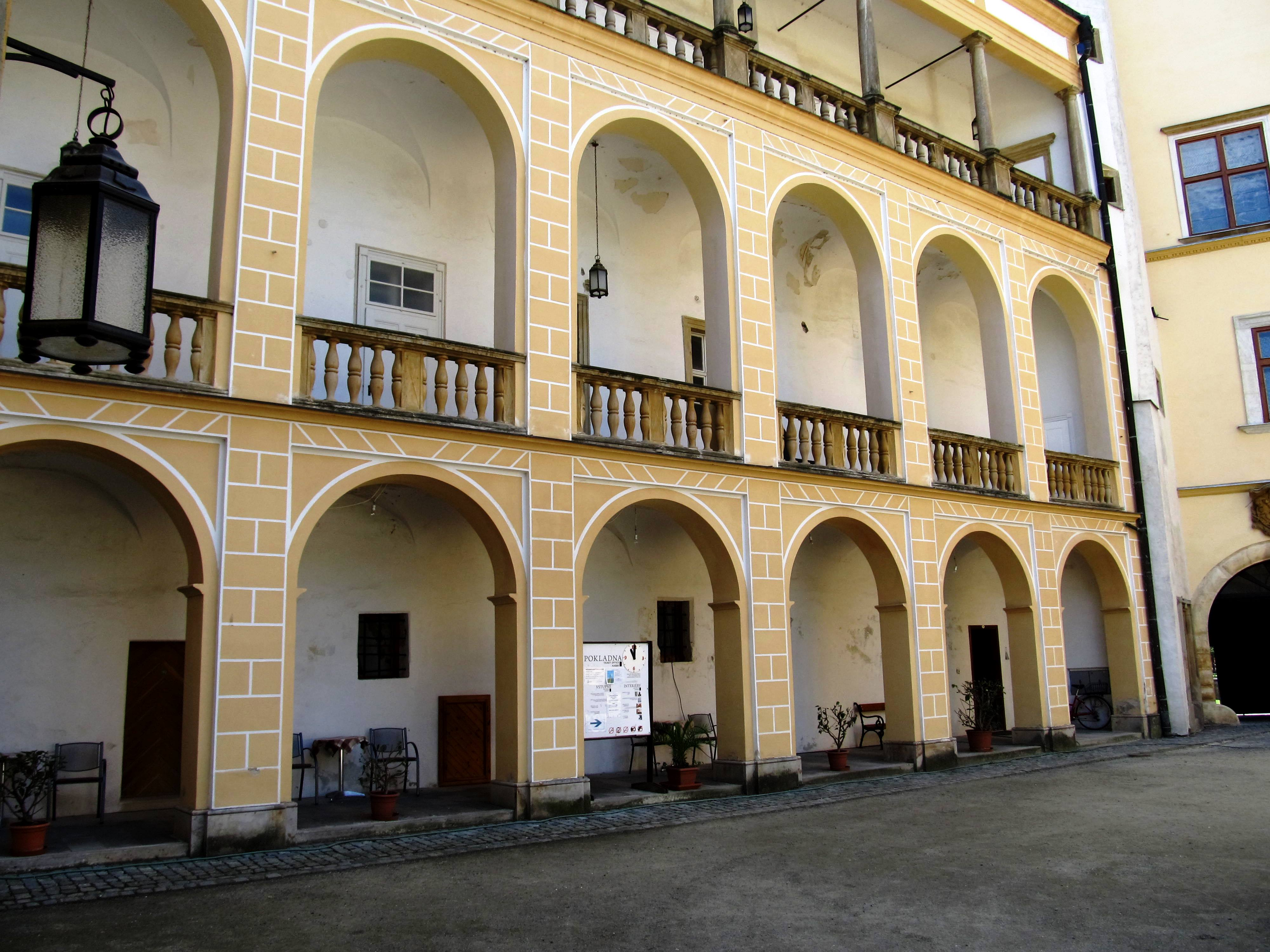 Tovačov zámek